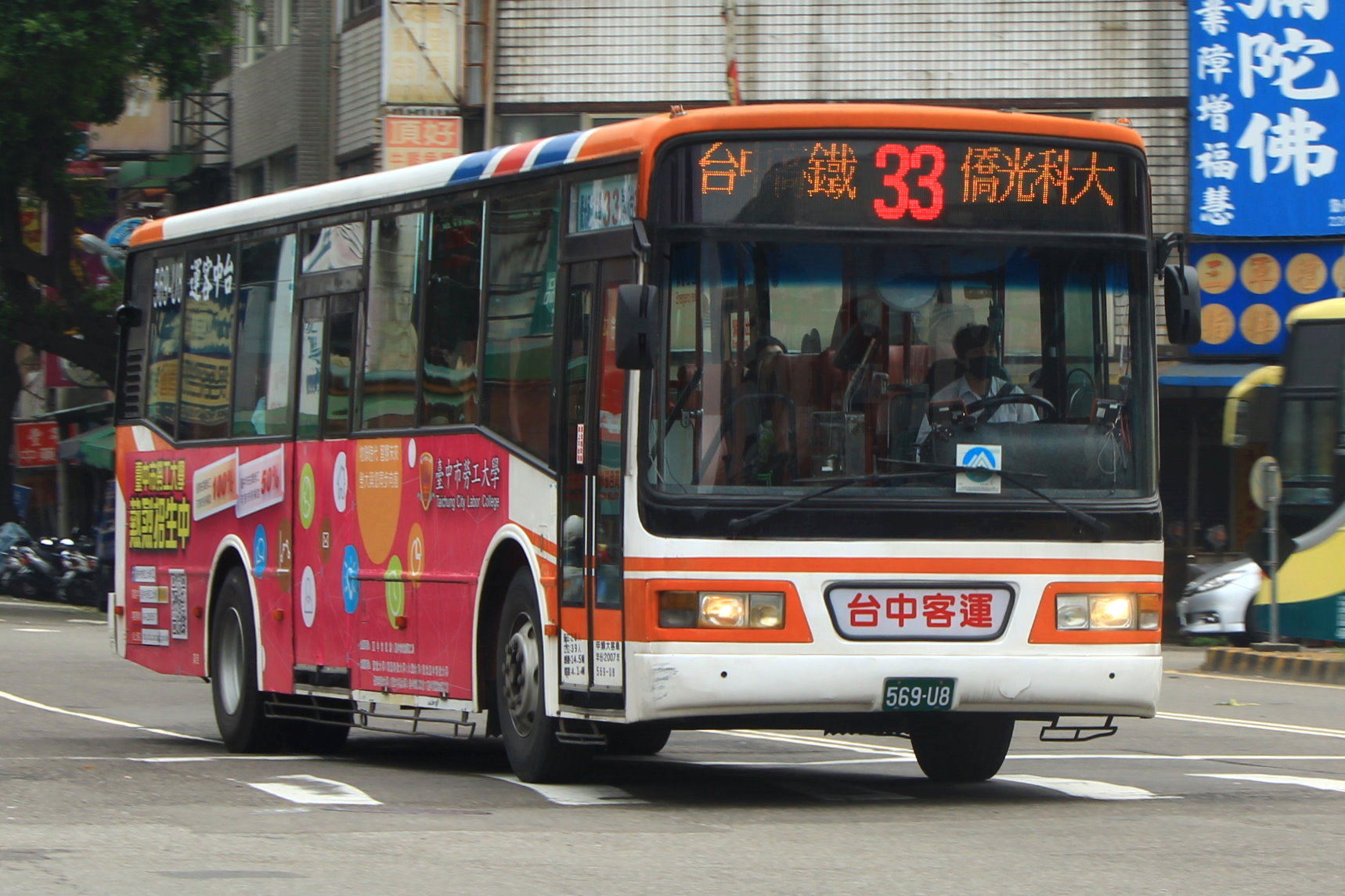 中文（台灣）: 33 干城站~